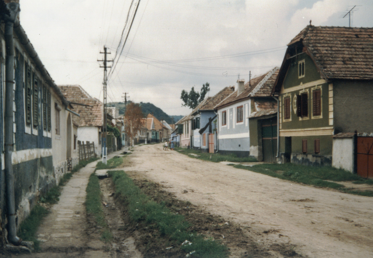 Bólya egyik utcája (Szeben megye, Erdély)